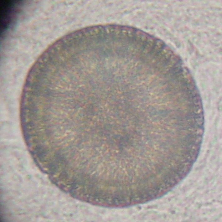 Bandwurmei, Gurkenkernbandwurm (Dipylidium caninum), mikroskopisch Autor: Kalumet, selbst erstellt